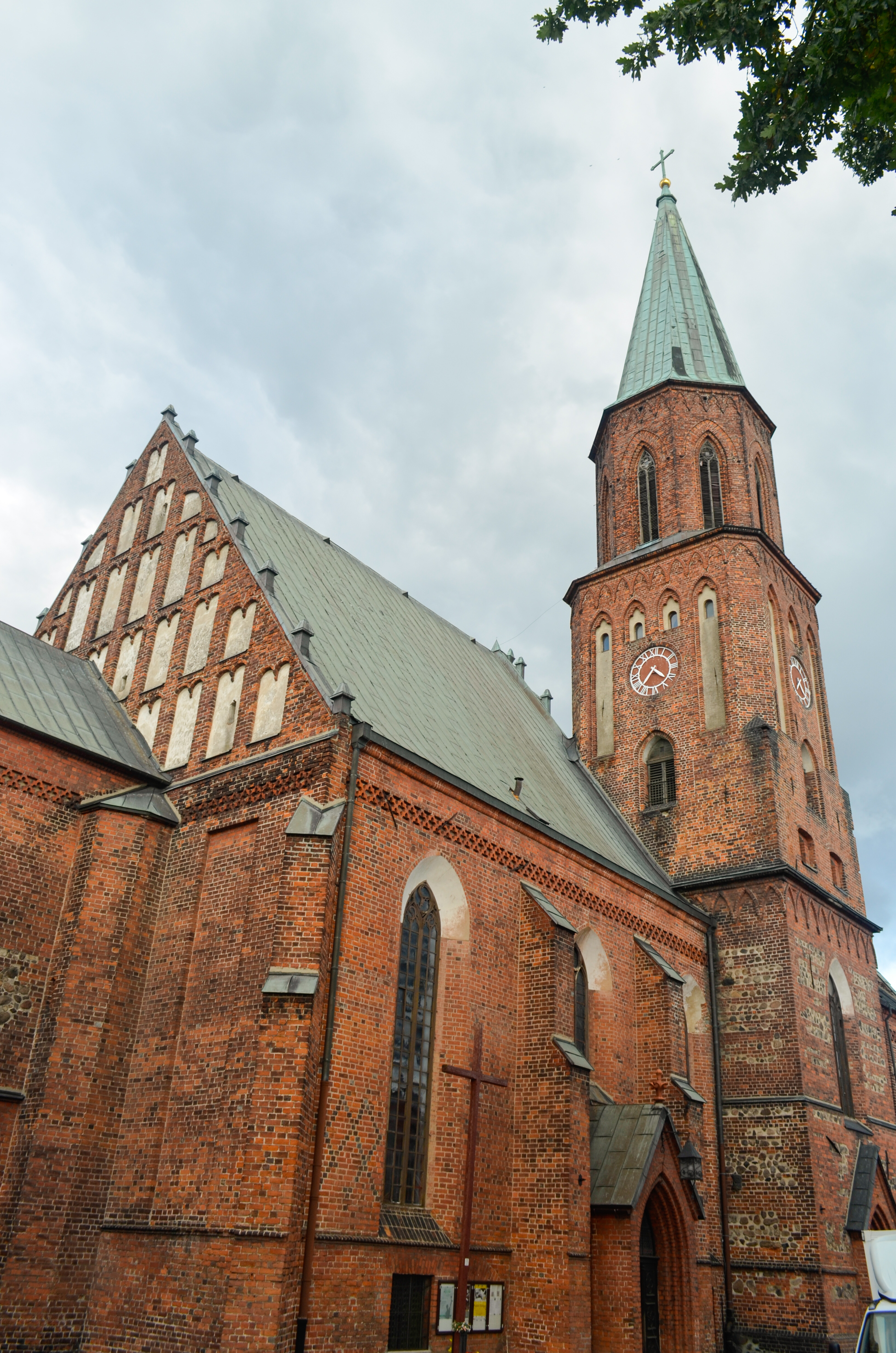 Sulechów, kościół par. p.w. Podwyższenia Krzyża Św., XIV, XVII